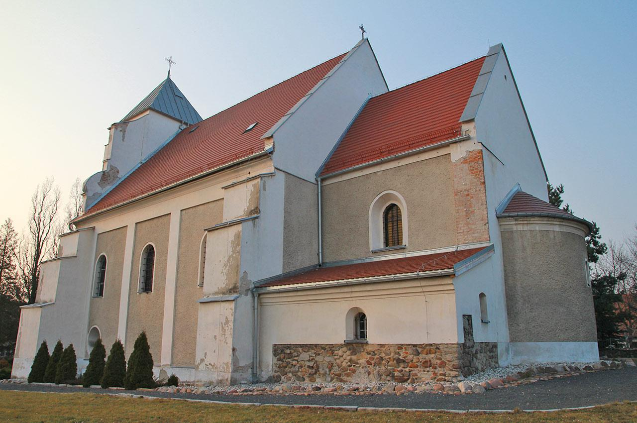 Kościół w Pakosławicach